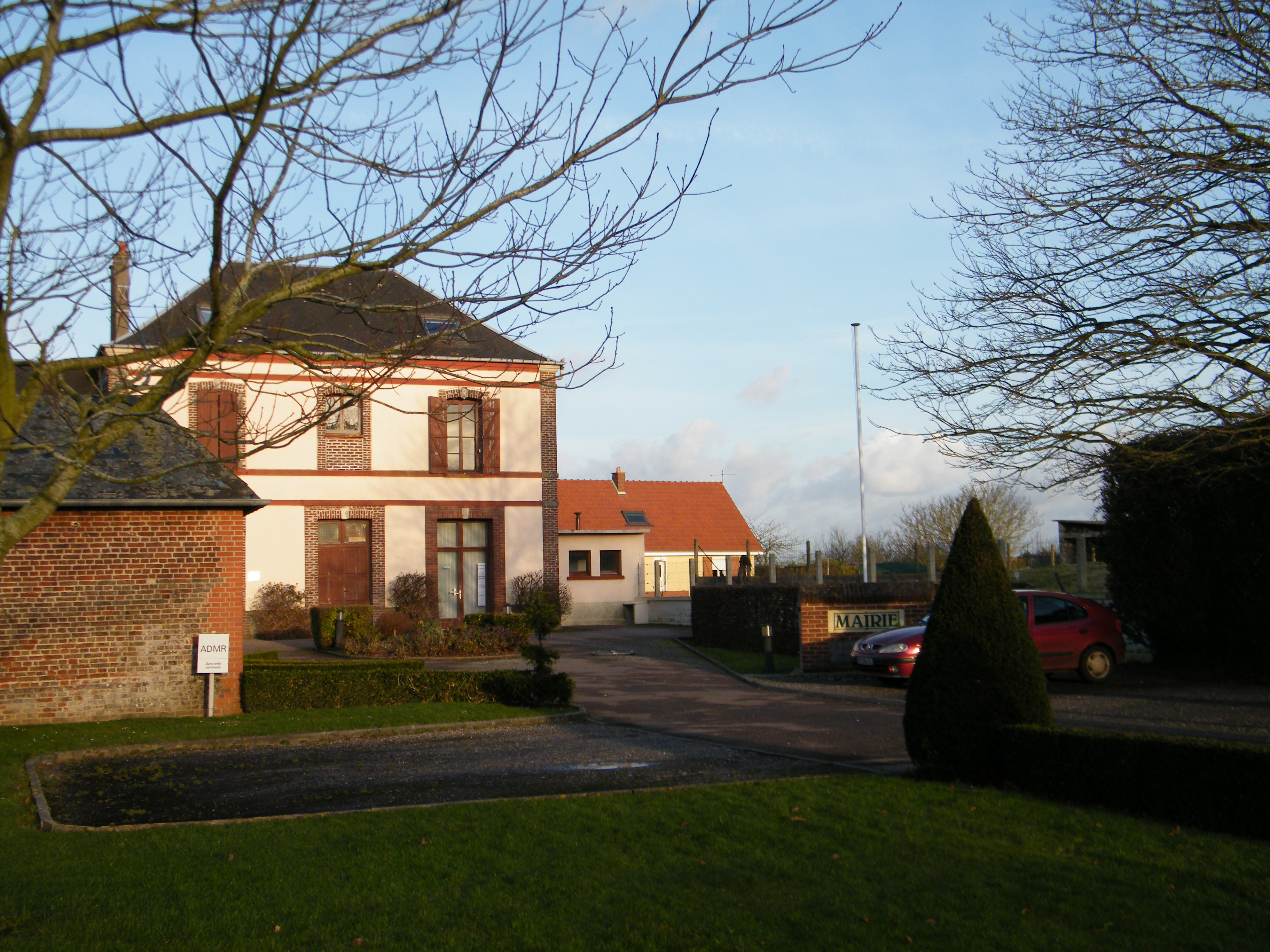 Mairie de Canehan, Seine-Maritime, France.